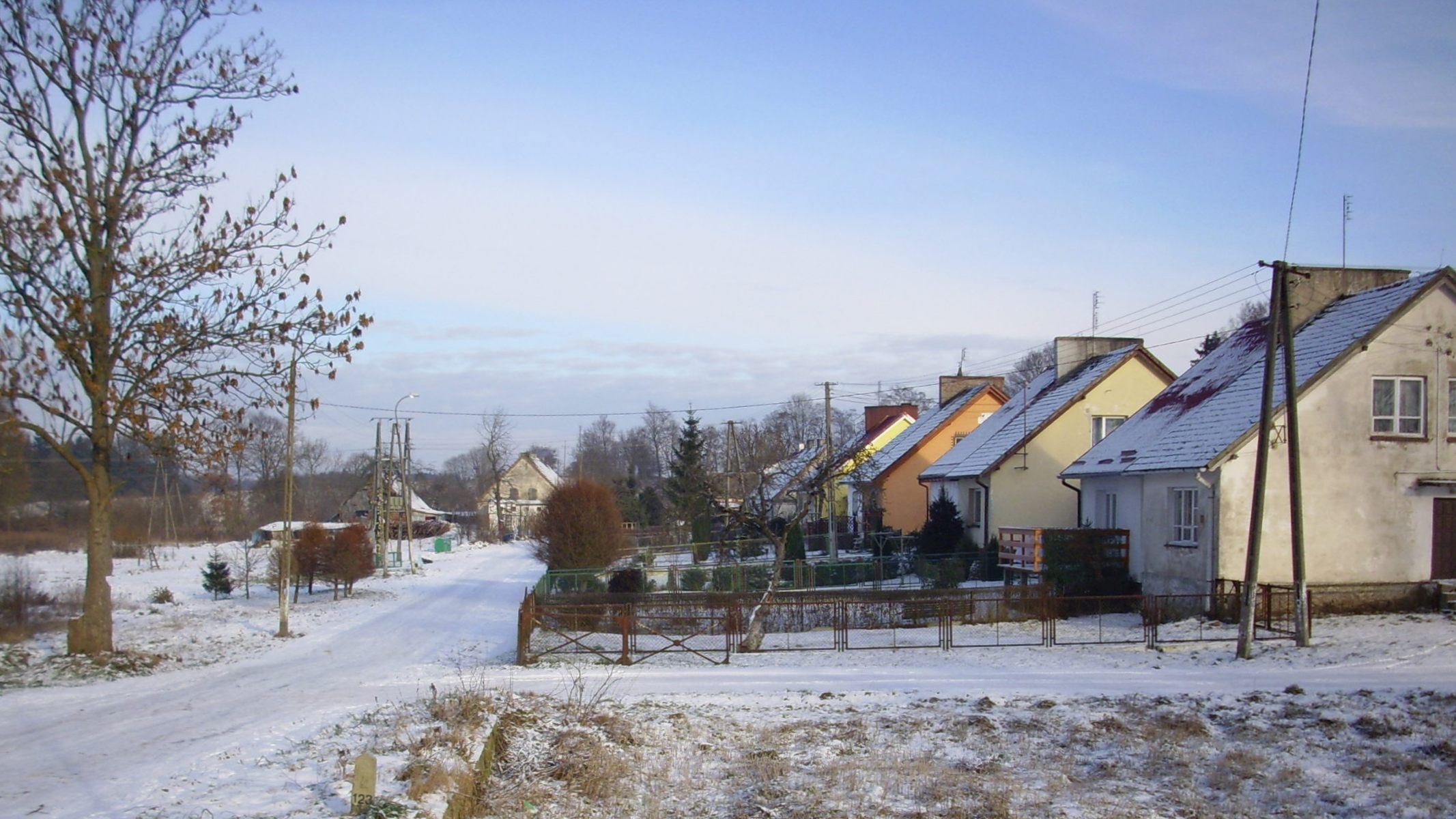 Mołtowo (gm. Gościno, pow. kołobrzeski, woj. zachodniopomorskie) zimą.